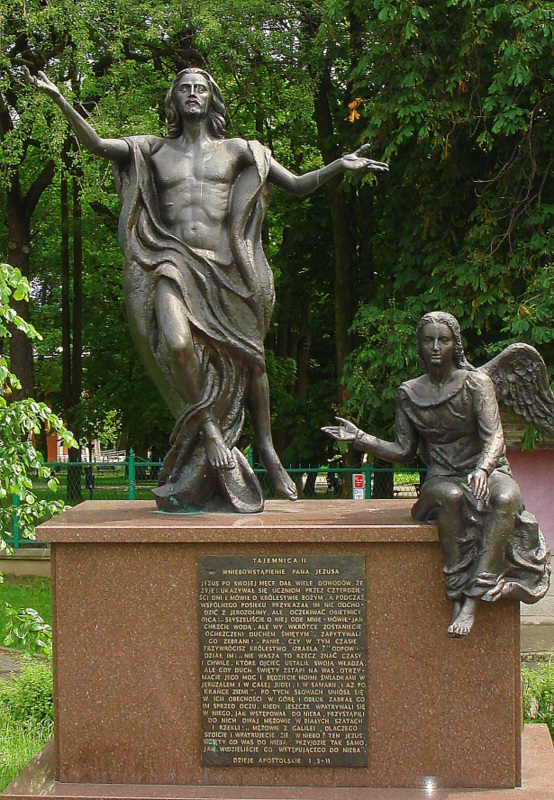 Częstochowa, zespół klasztorny paulinów na Jasnej Górze